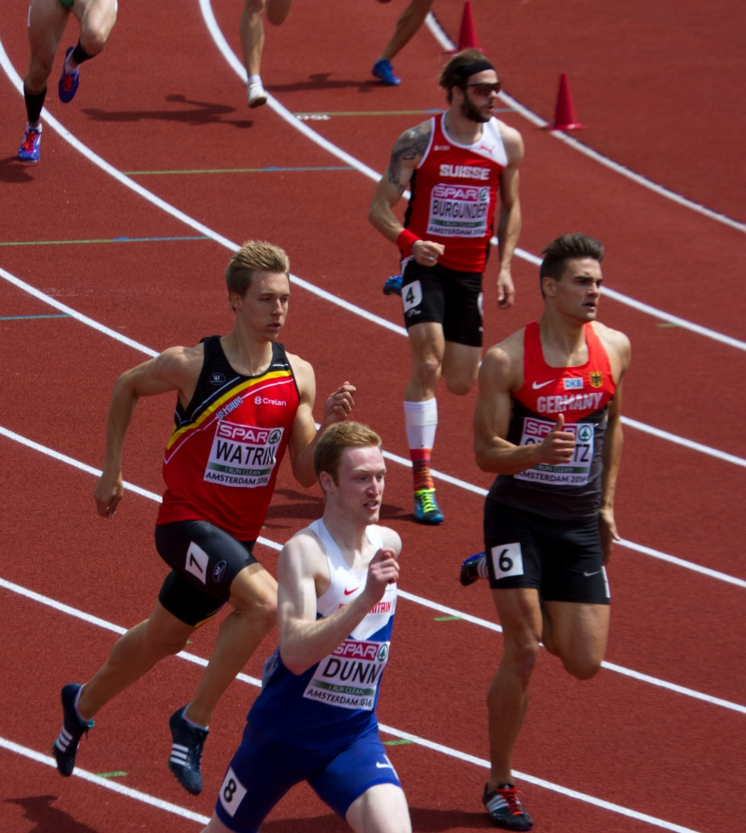 0137 reeksen 400m watrin